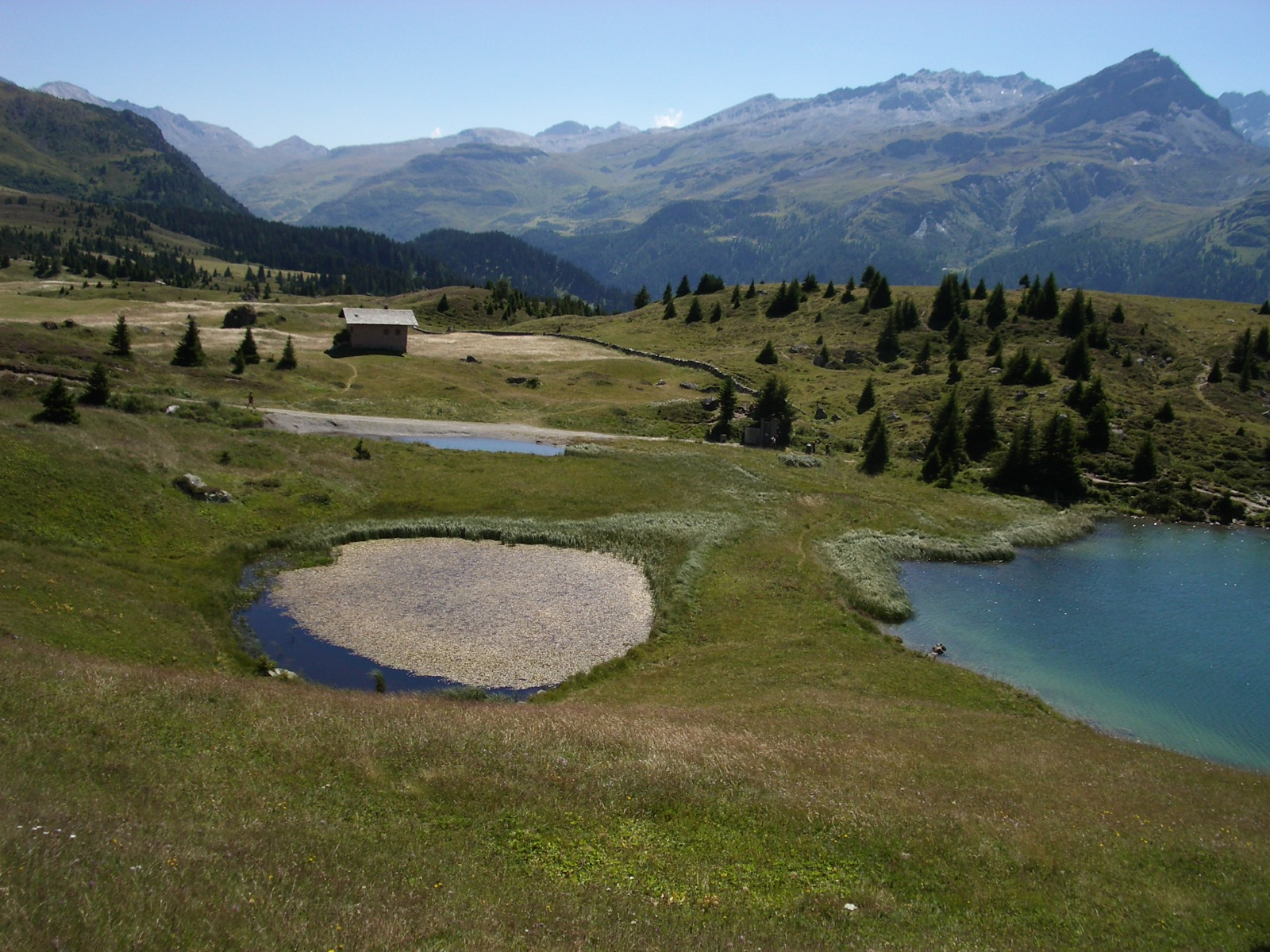 Alp Flix GR, Switzerland